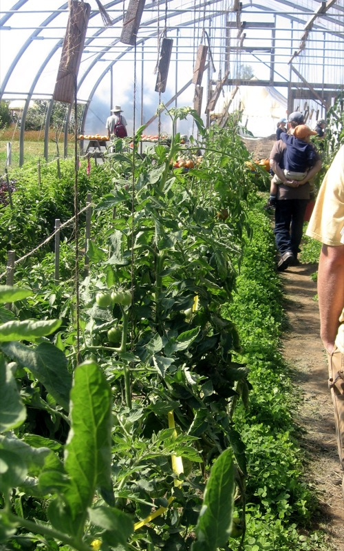 MOFGA Greenhouse